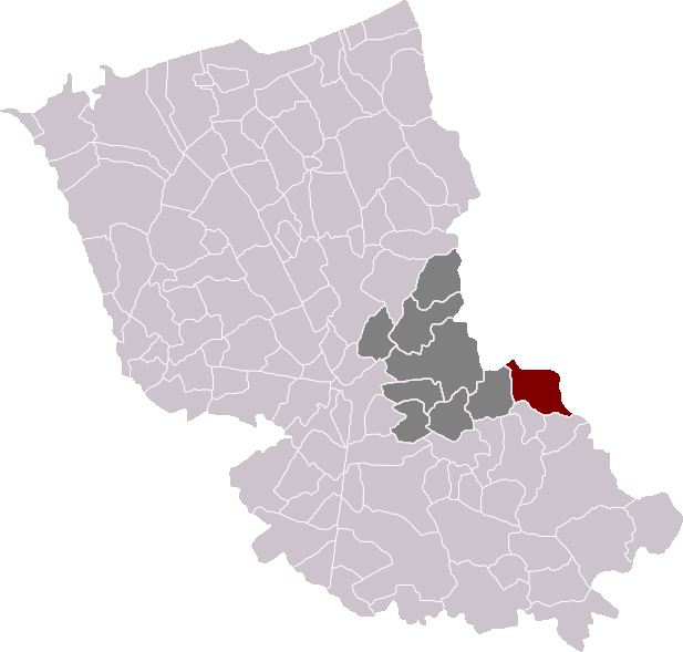 Locatie gemeente Boeschepe in arrondissement Duinkerke. Zelfgemaakt. Location of Boeschepe municipality in the arrondissement of Dunkirk. Self made. Localisation de la commune de Boeschepe dans l'arrondissement de Dunkerque. Fait moi-même.